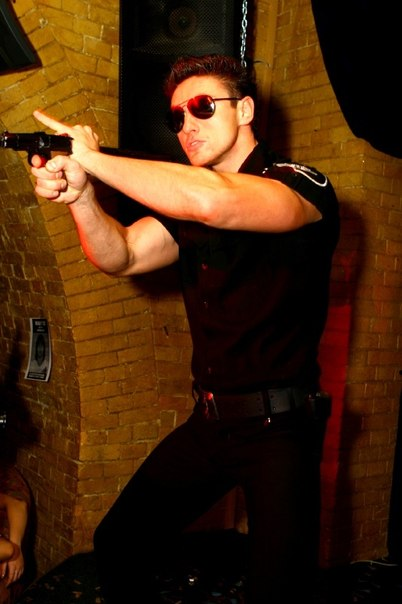 Мужской стриптиз в форме полицейского.